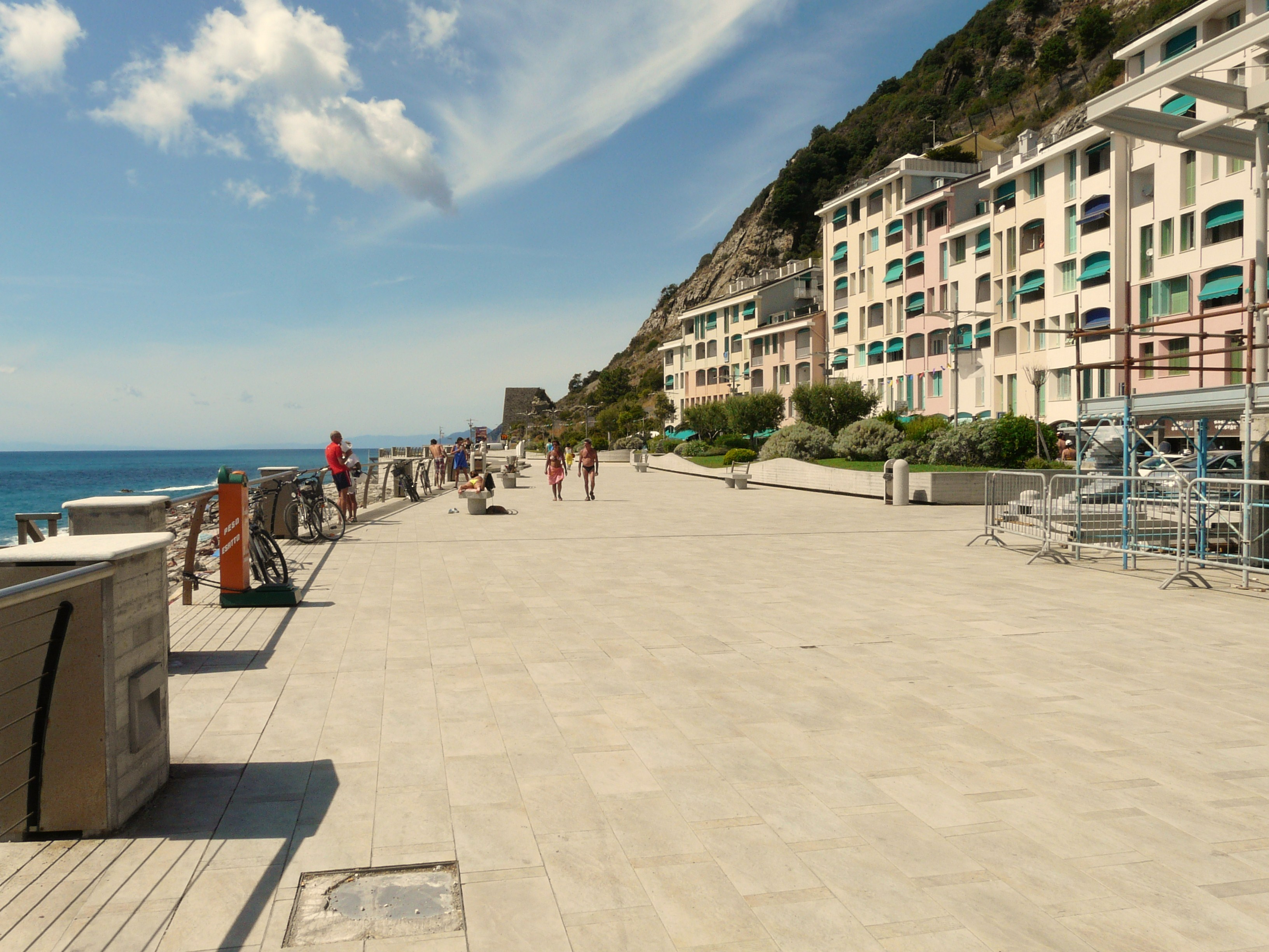 Lungomare di Deiva Marina, Liguria, Italia